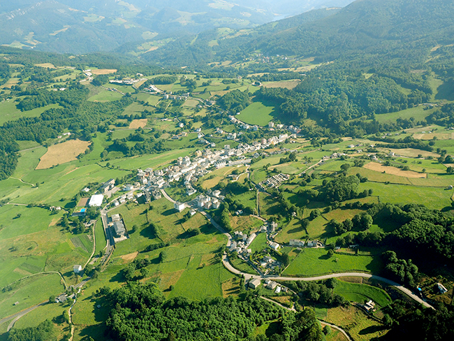 OLYMPUS EM-1